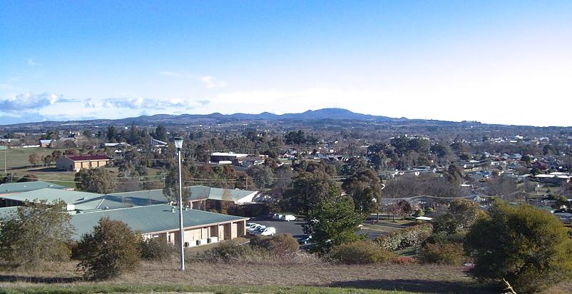 Foto de Orange, Nova Gales do Sul, AustrÃ¡lia. Fonte: Wikipedia usuÃ¡rio Athaydesbr. Coloco a foto em domÃ­nio pÃºblico.